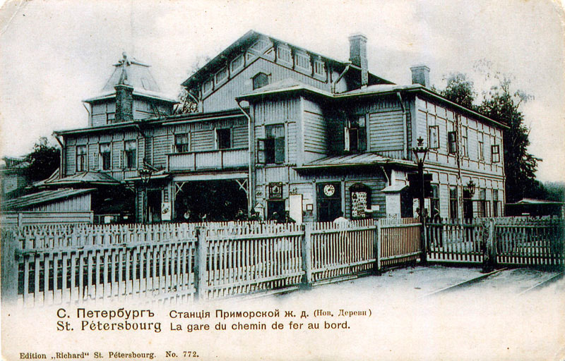 Вокзал приморской железной дороги (Новая деревня)